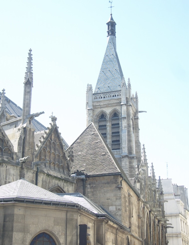 Paris, église Saint-Séverin, clocher